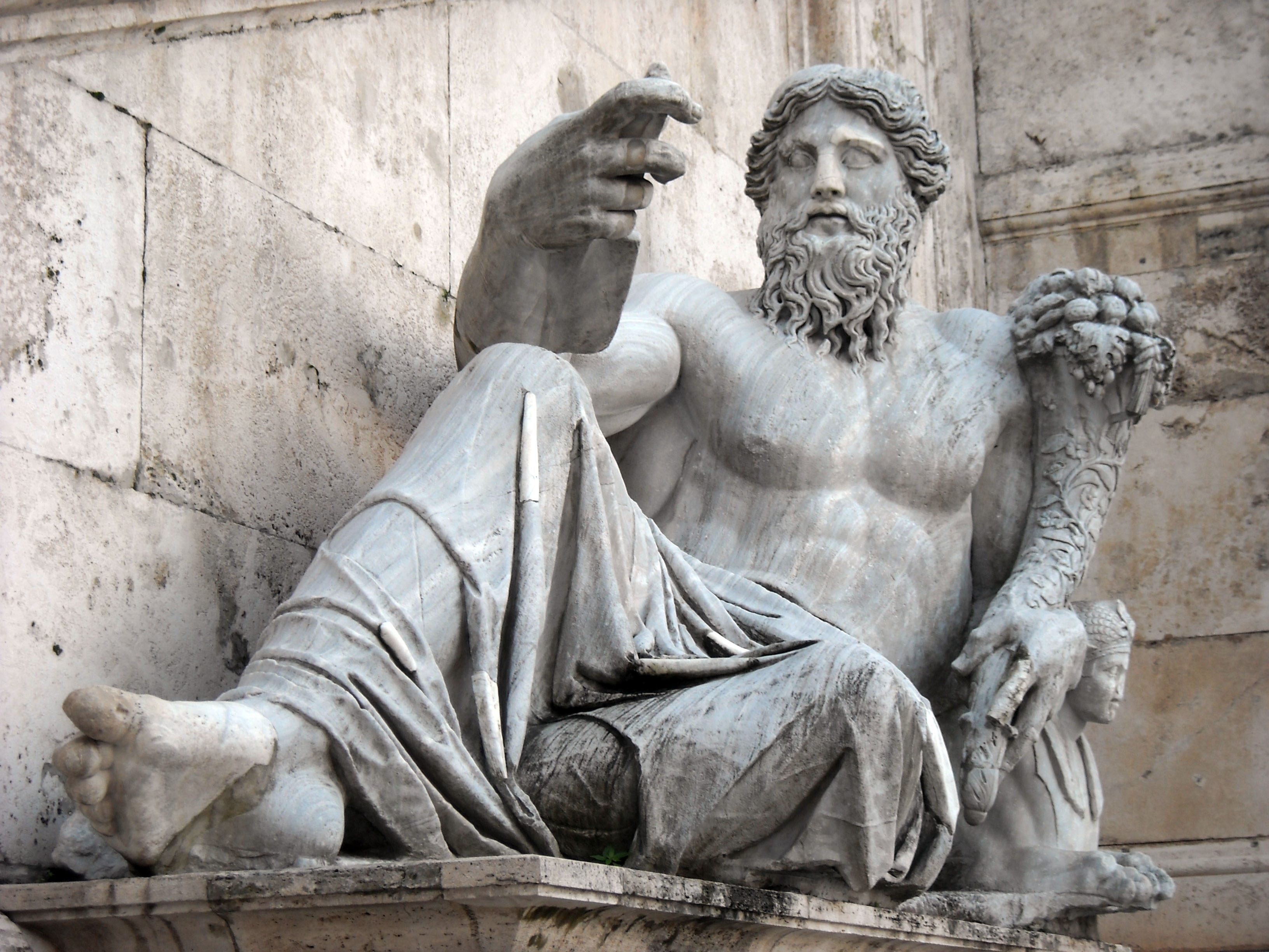 La statua del Nilo, nella fontana della Dea Roma, a piazza del Campidoglio